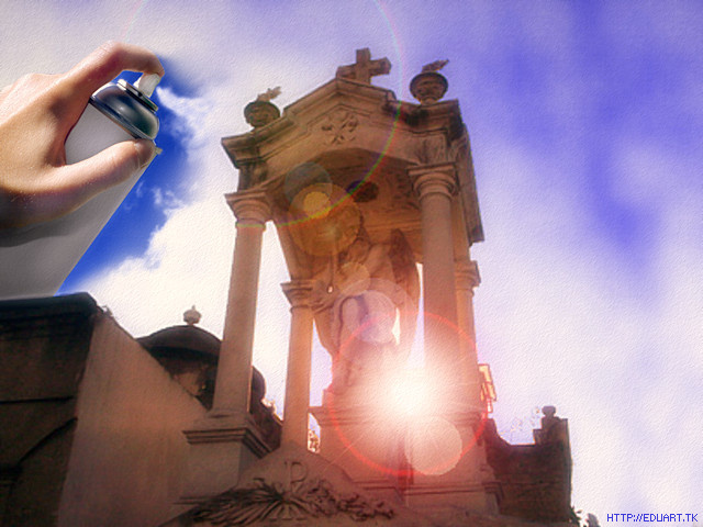 Obra digital de EduArt